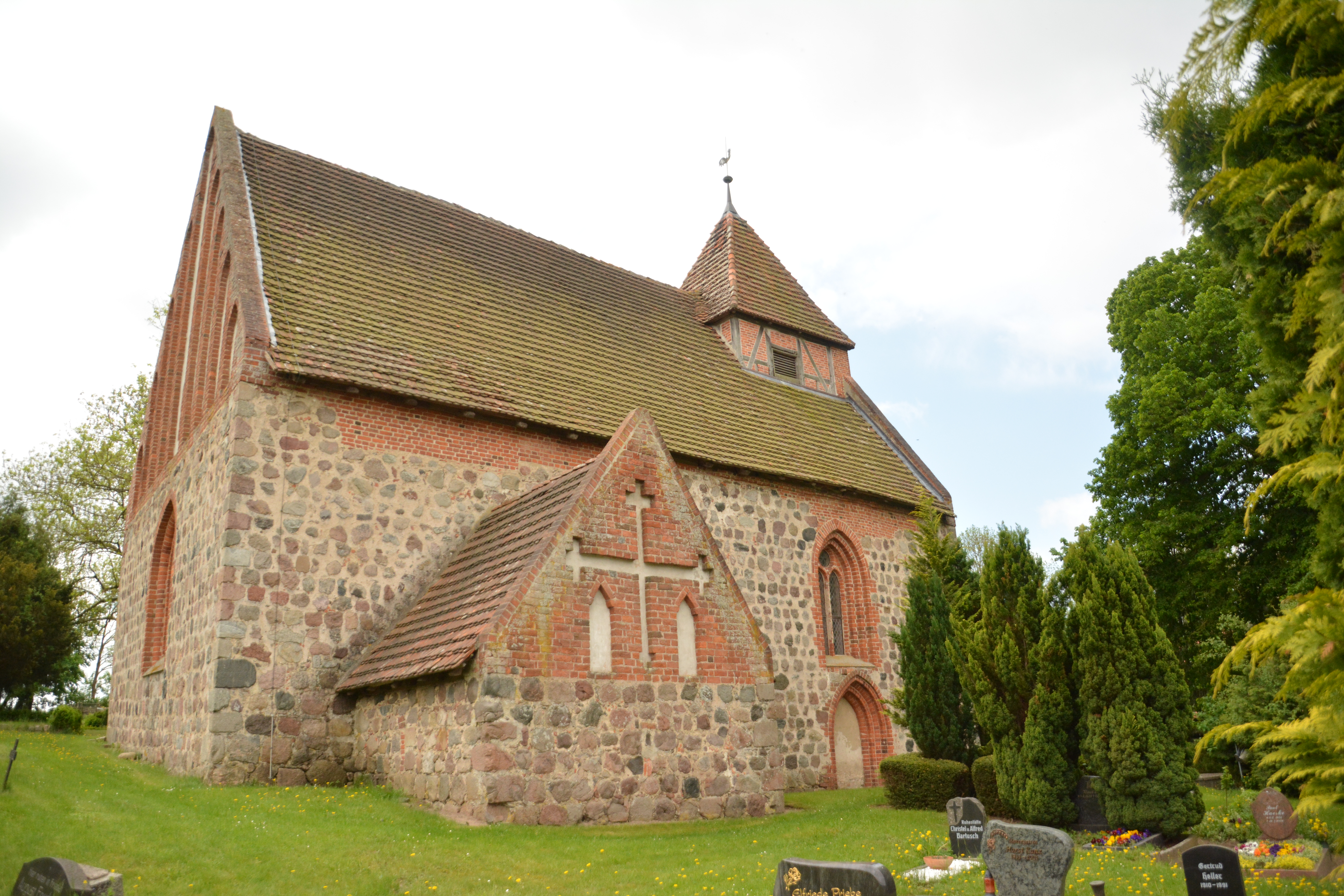 Dorfkirche Badendiek Nordostansicht